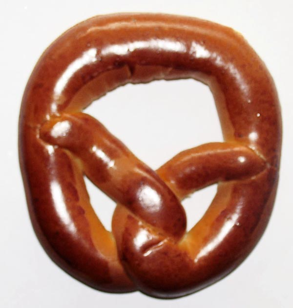 Viipurinrinkeli